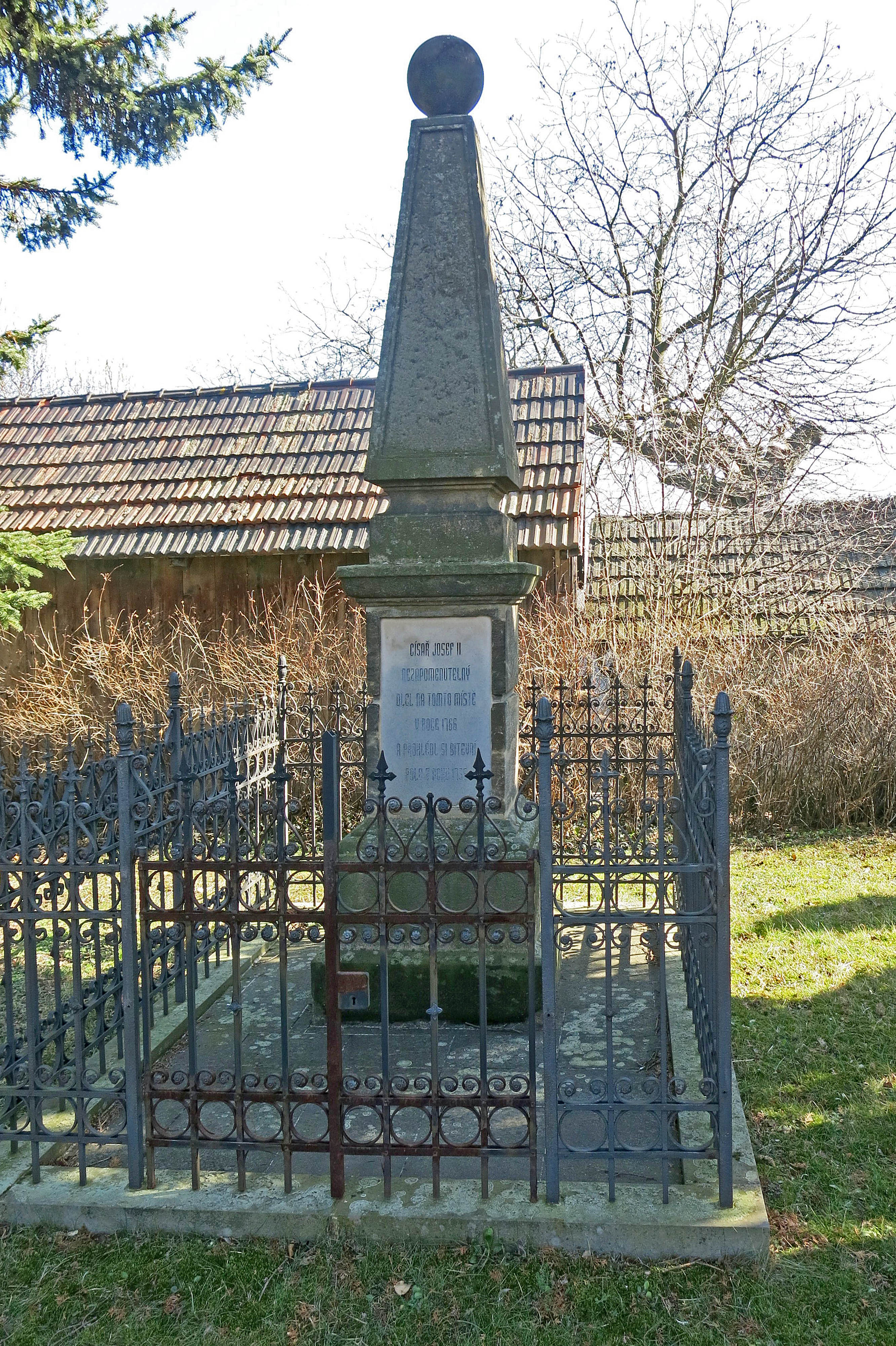 Lovosice, Ústecká 114, památník zbudovaný roku 1768 na paměť návštěvy císaře Josefa II., zde zastavil v roce 1766 na své cestě do Drážďan.